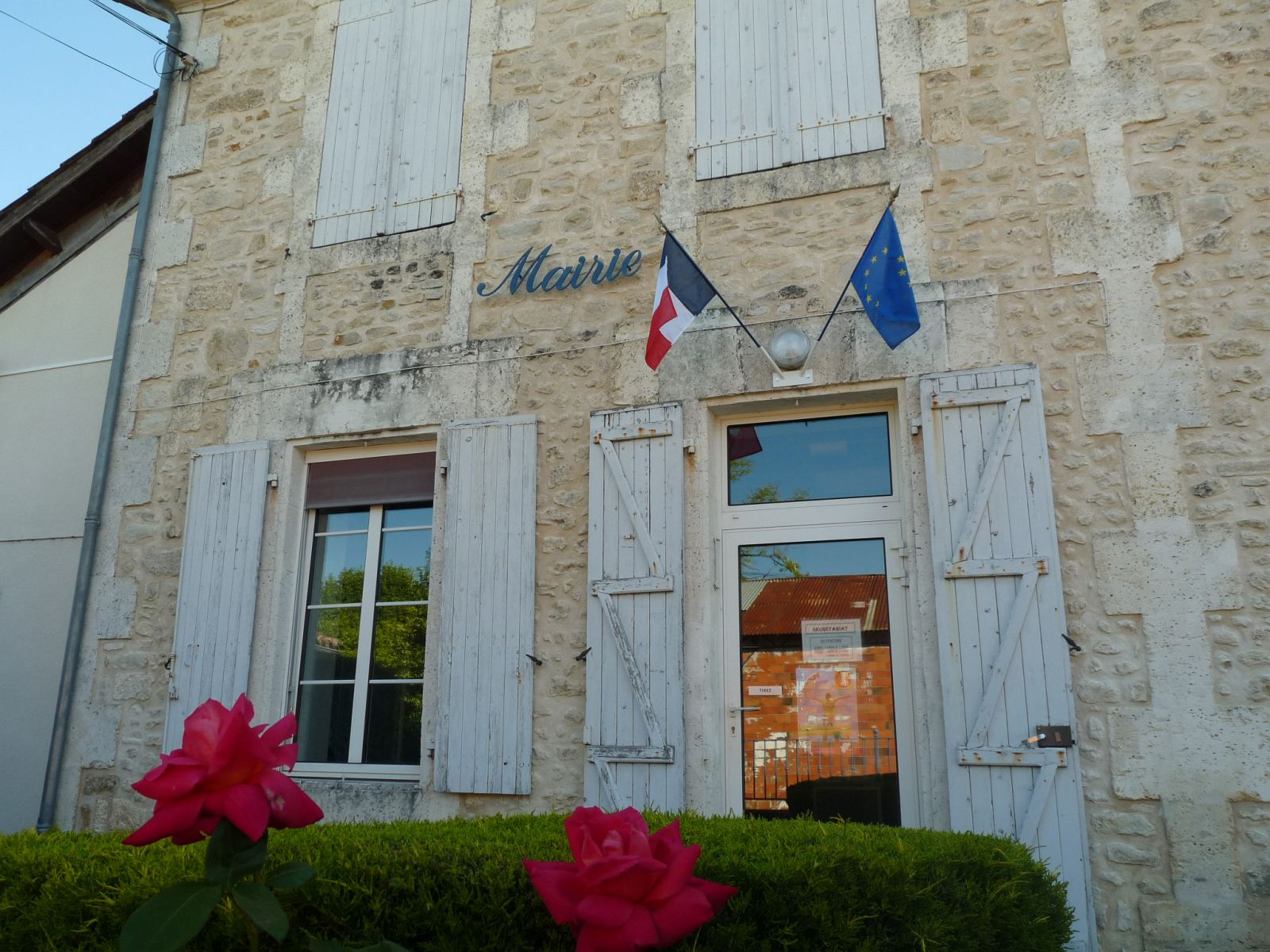 mairie d'Aignes-et-Puypéroux (16), France